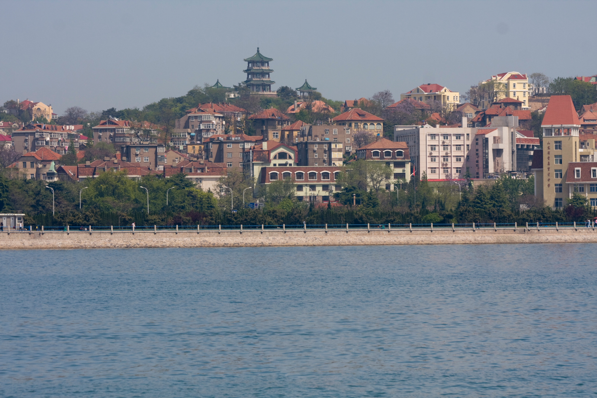 Qingdao, China